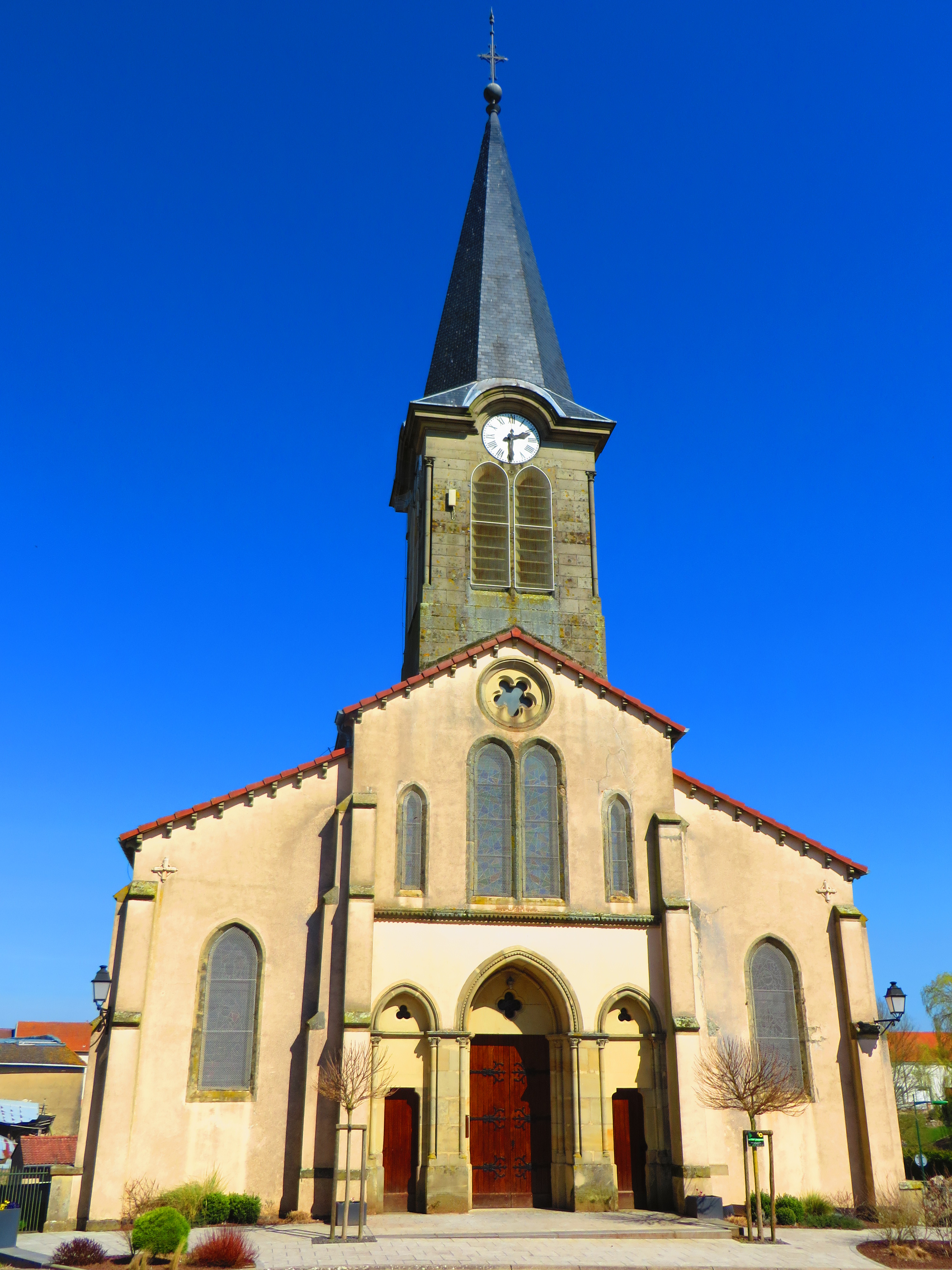 Eincheville Église Saint-Gengoulf